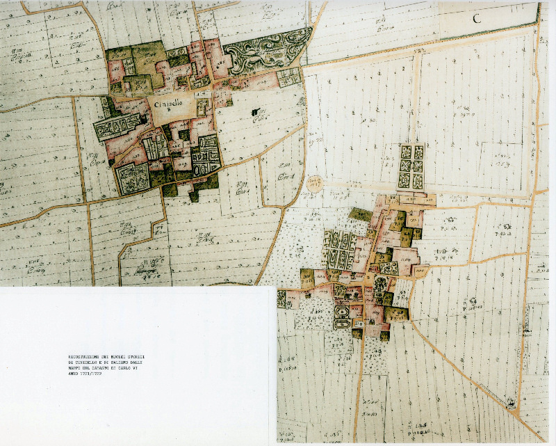 Ricostruzione dei nuclei storici di Cinisello e di Balsamo dalle mappe del catasto di Carlo VI